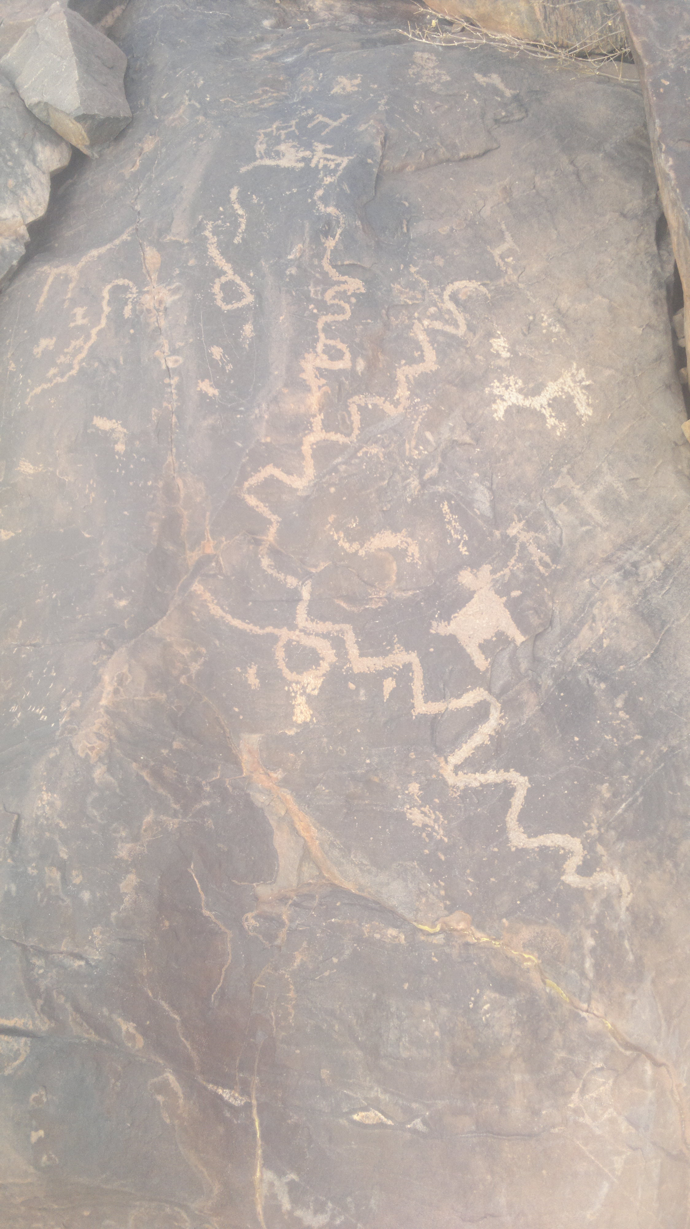 Monumento. Petróglifos en El Duraznito